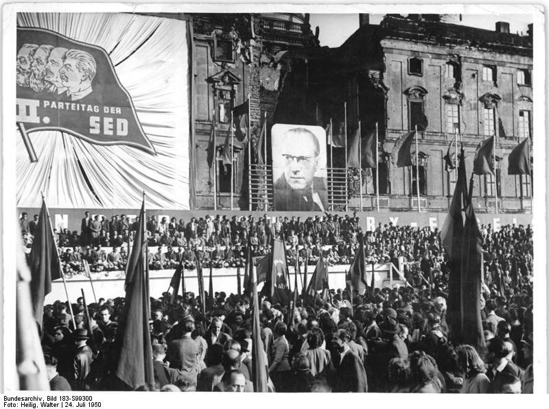 Internationale Kundgebung für Frieden, Einheit und Aufbau in Berlin. Zum Abschluß des III. Parteitages der SED fand am 24.7.50 auf dem Lustgarten in Berlin eine große internationale Kundgebung statt, auf der Wilhelm Pieck und ausländische Delegierte sprachen. UBz: Berliner auf der Demonstration. Zentralbild-Heilig Ho. 7993-50 24.7.1950